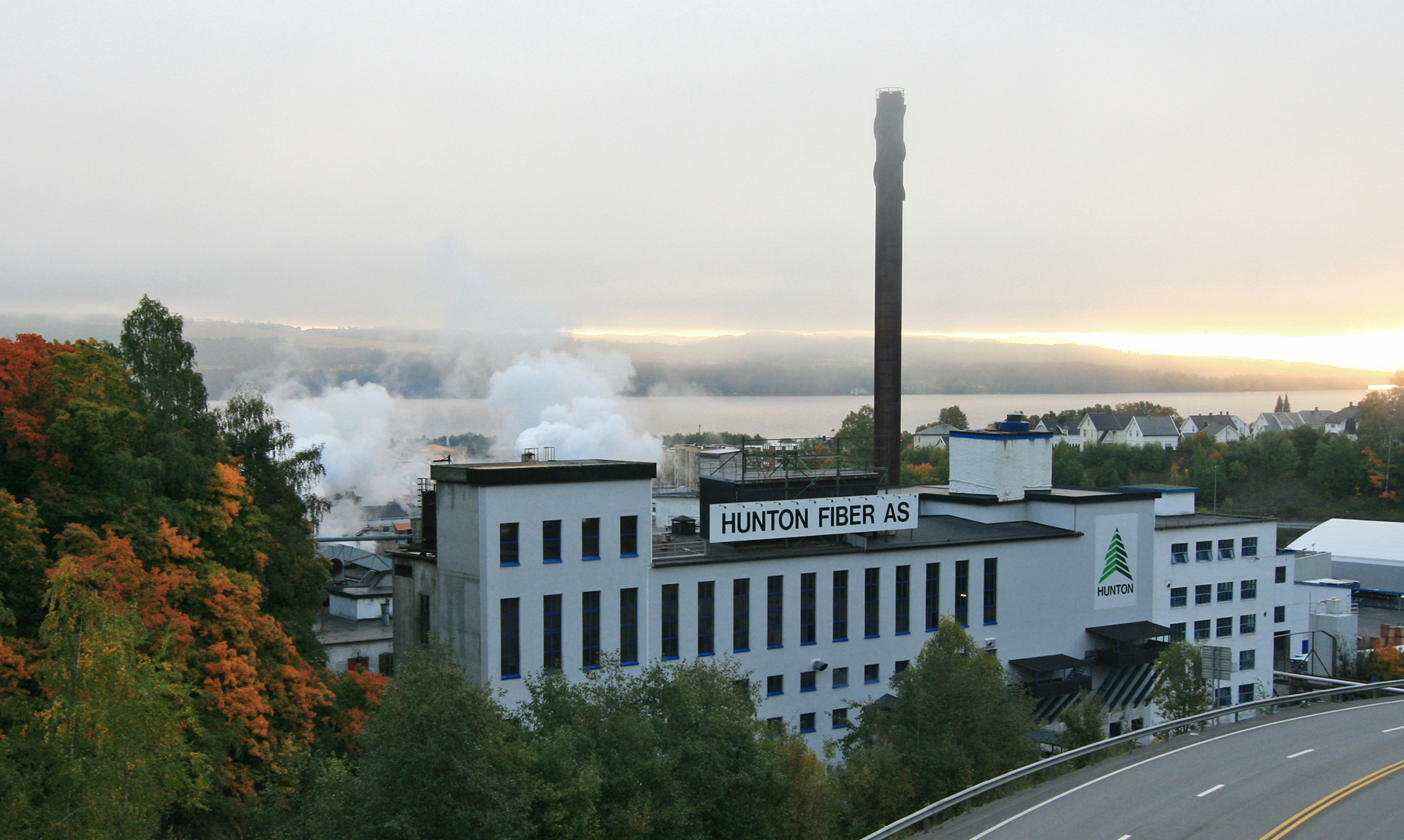 Hunton Fiber, Gjøvik